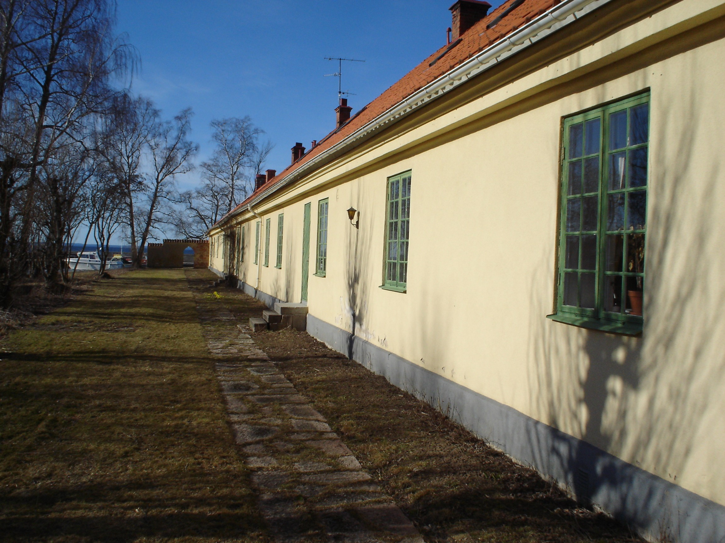 Vandrarhemmet i Borghamn, Östergötland. Fotograf: Gamnacke Datum: 26 mars 2005